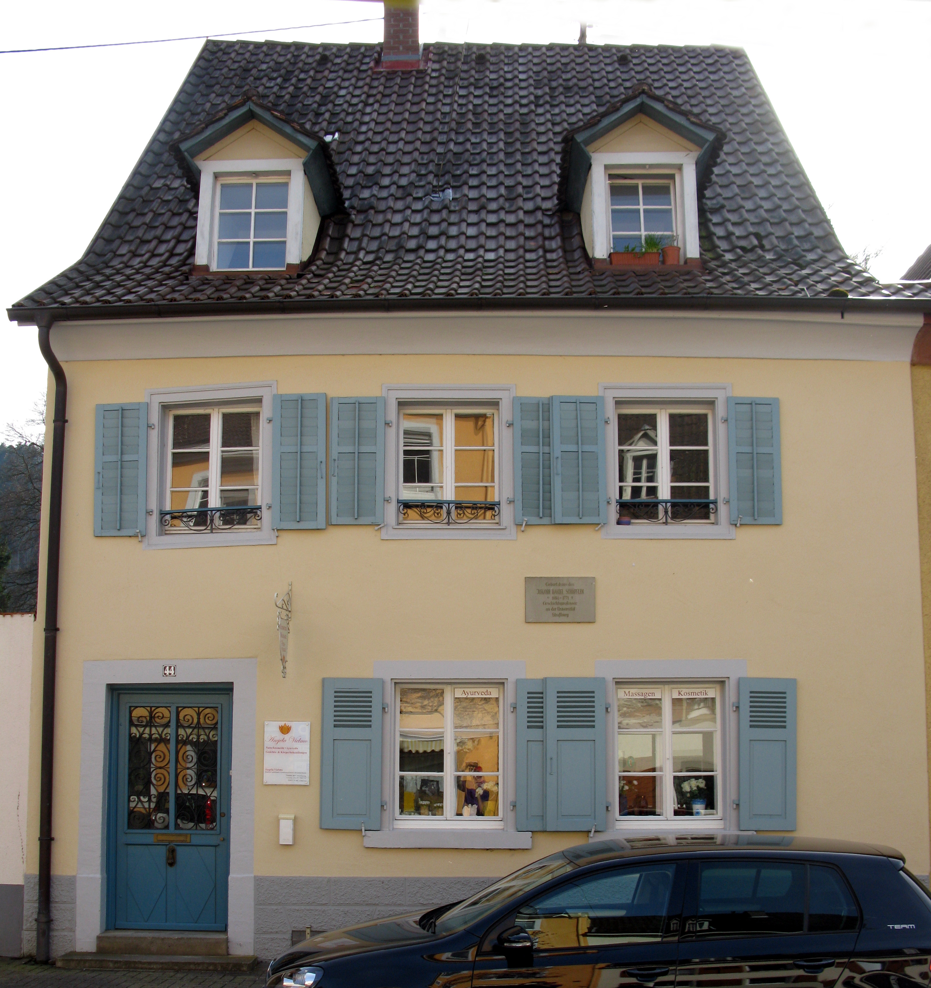 Johann Daniel Schöpflins Geburtshaus in Sulzburg